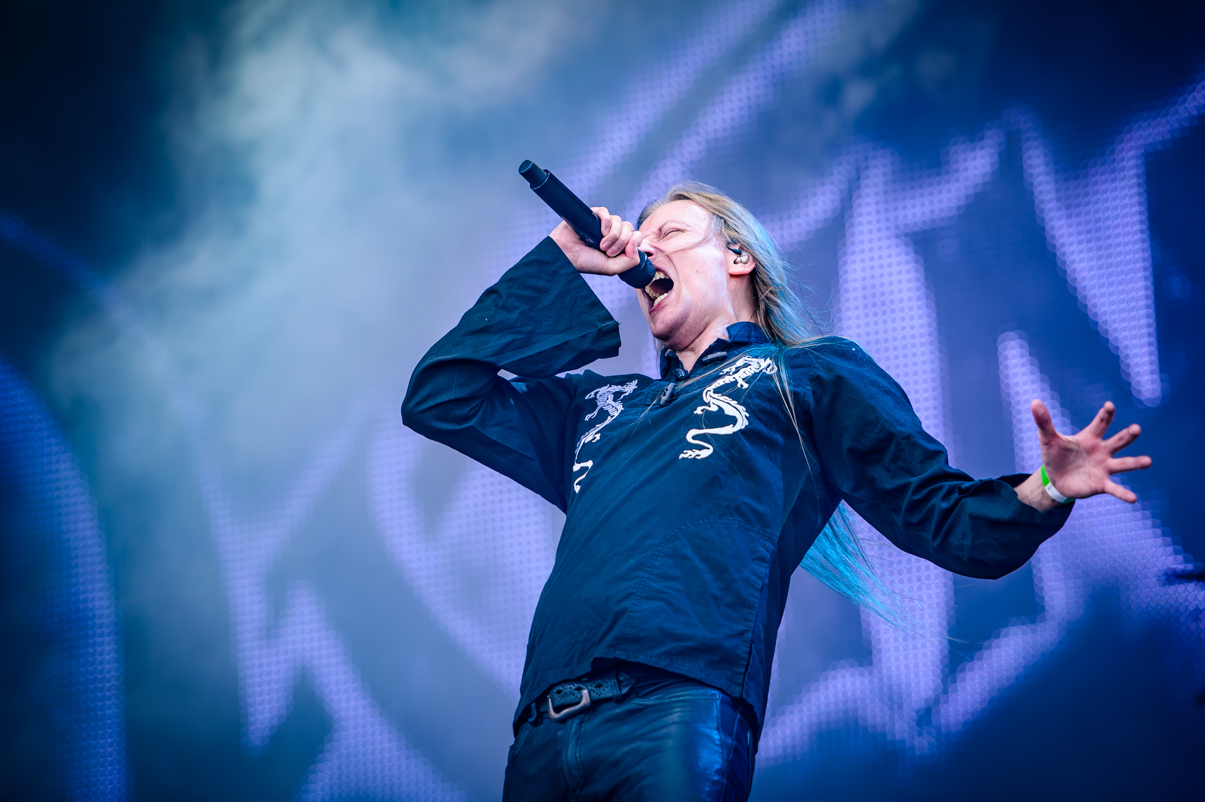 'Wacken Open Air 2018': 'Wintersun'